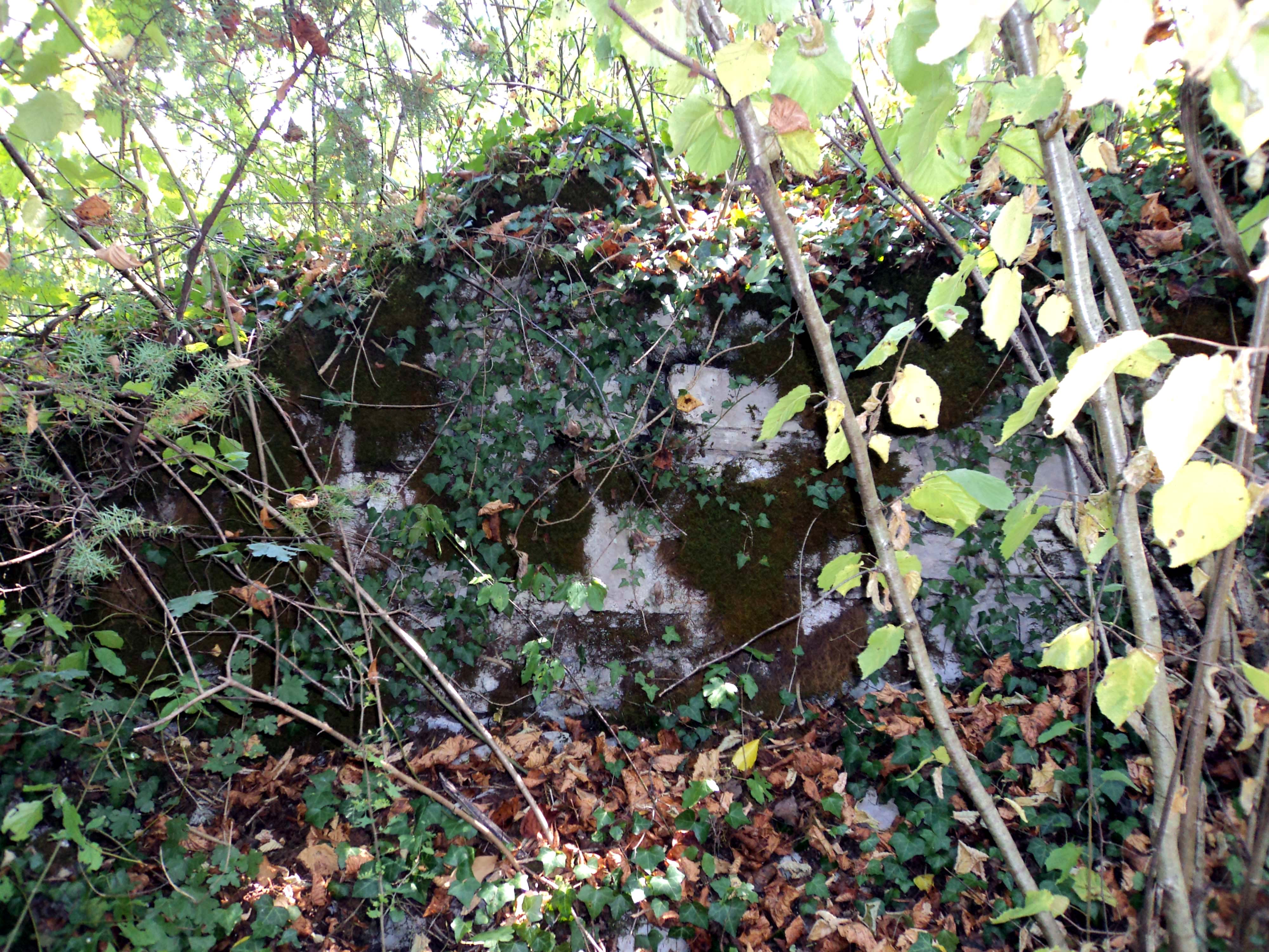 Ostanki Kovačigrajskega gradu leta 2010